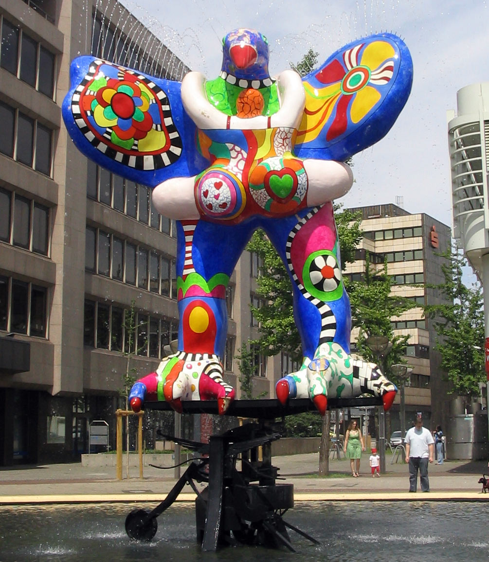 Nana in Duisburgs Innenstadt